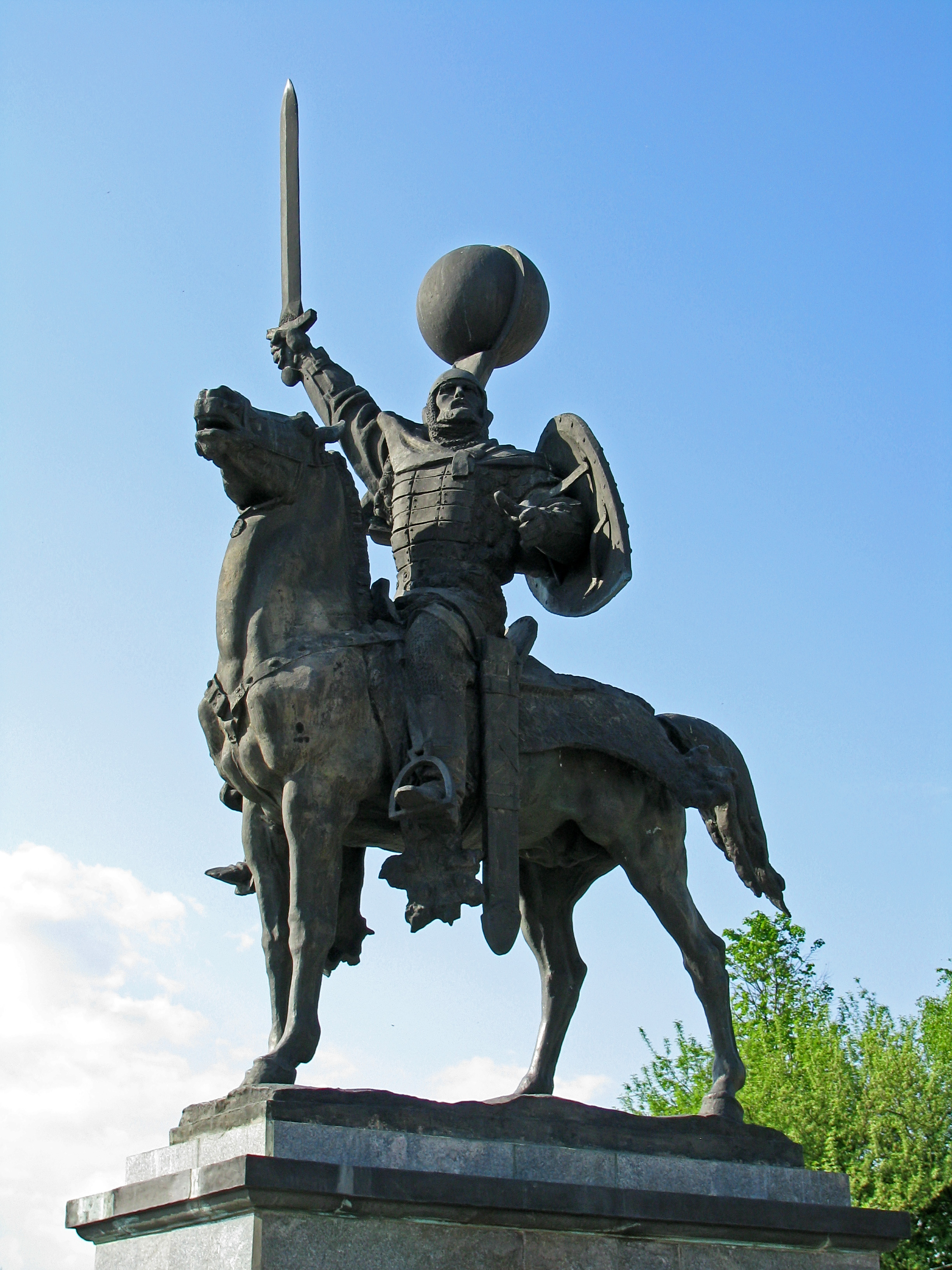 Пам'ятник князю Ігорю, Новгород-Сіверський, площа ім. Леніна